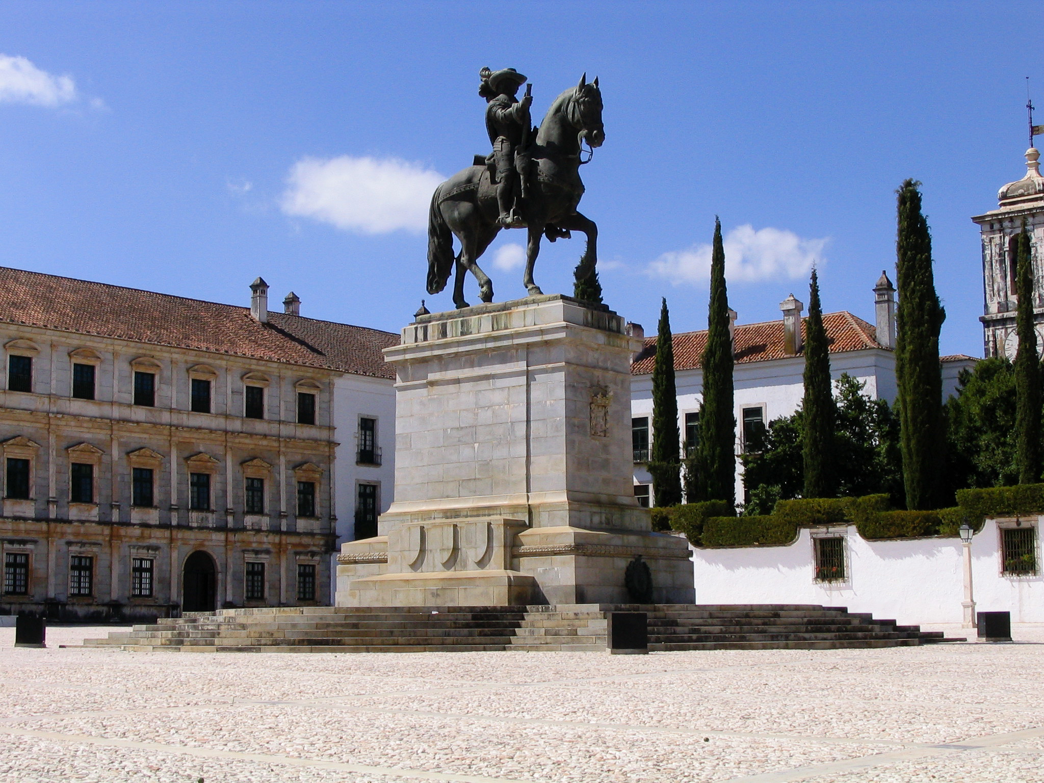 Paço Ducal de Vila Viçosa; Francisco Franco, estátua equestre de D. João IV, 1938-40 This file was uploaded for Wiki Loves Monuments in Portugal with the unique identifier 70205.